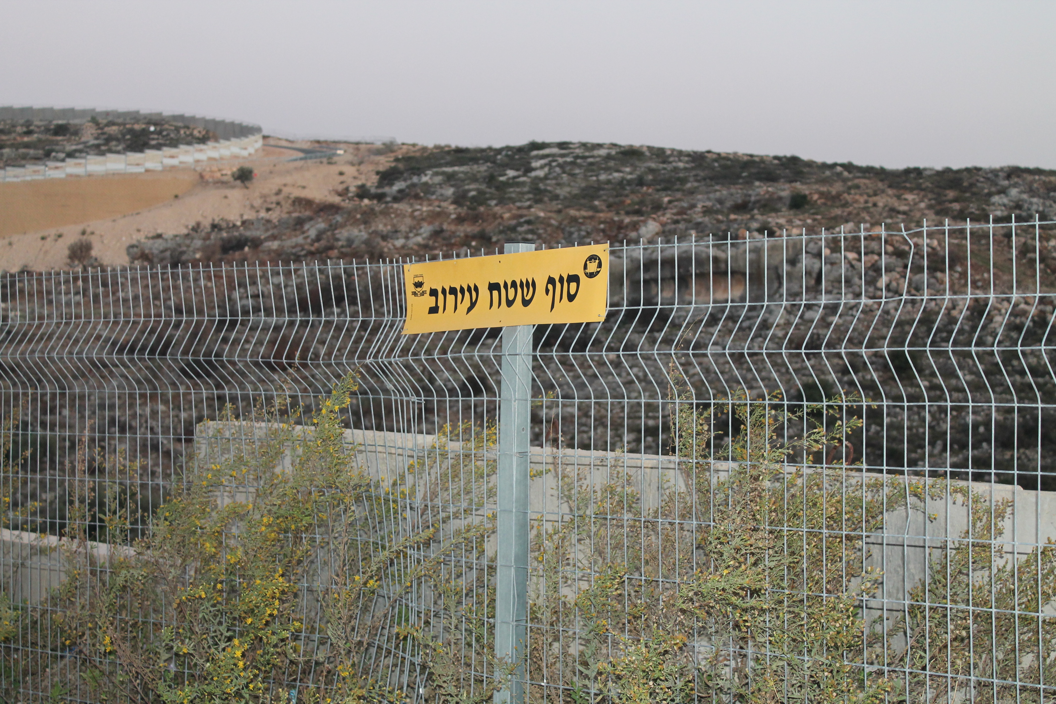 סוף שטח ערוב